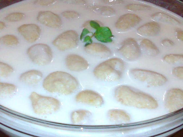 صورة لصحن كبة لبنية، حيث تعتبر الكبة اللبنية من اهم أطباق المطبخ الشامي عامة والمطبخ الحبي خاصة